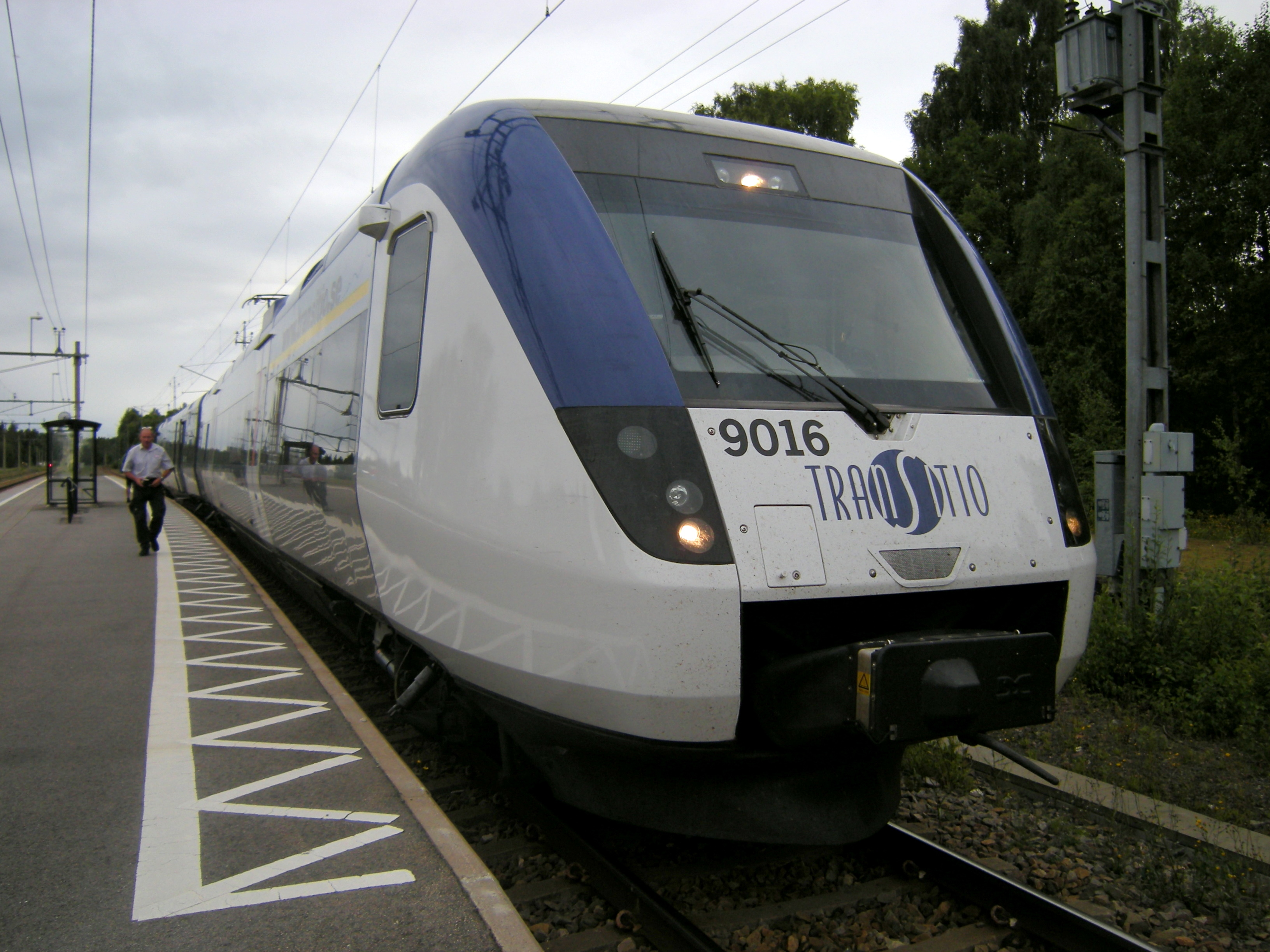 Transitio 9016 på väg från Östergötland via Närke till Dalarna och Gävle har stannat till i Grängesberg.